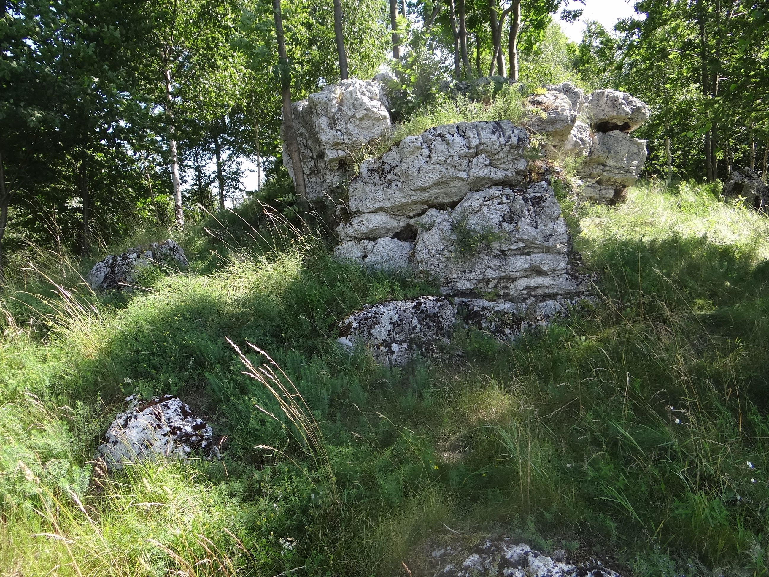 Skałki na wzgórzu Bolkowa w Ryczowie